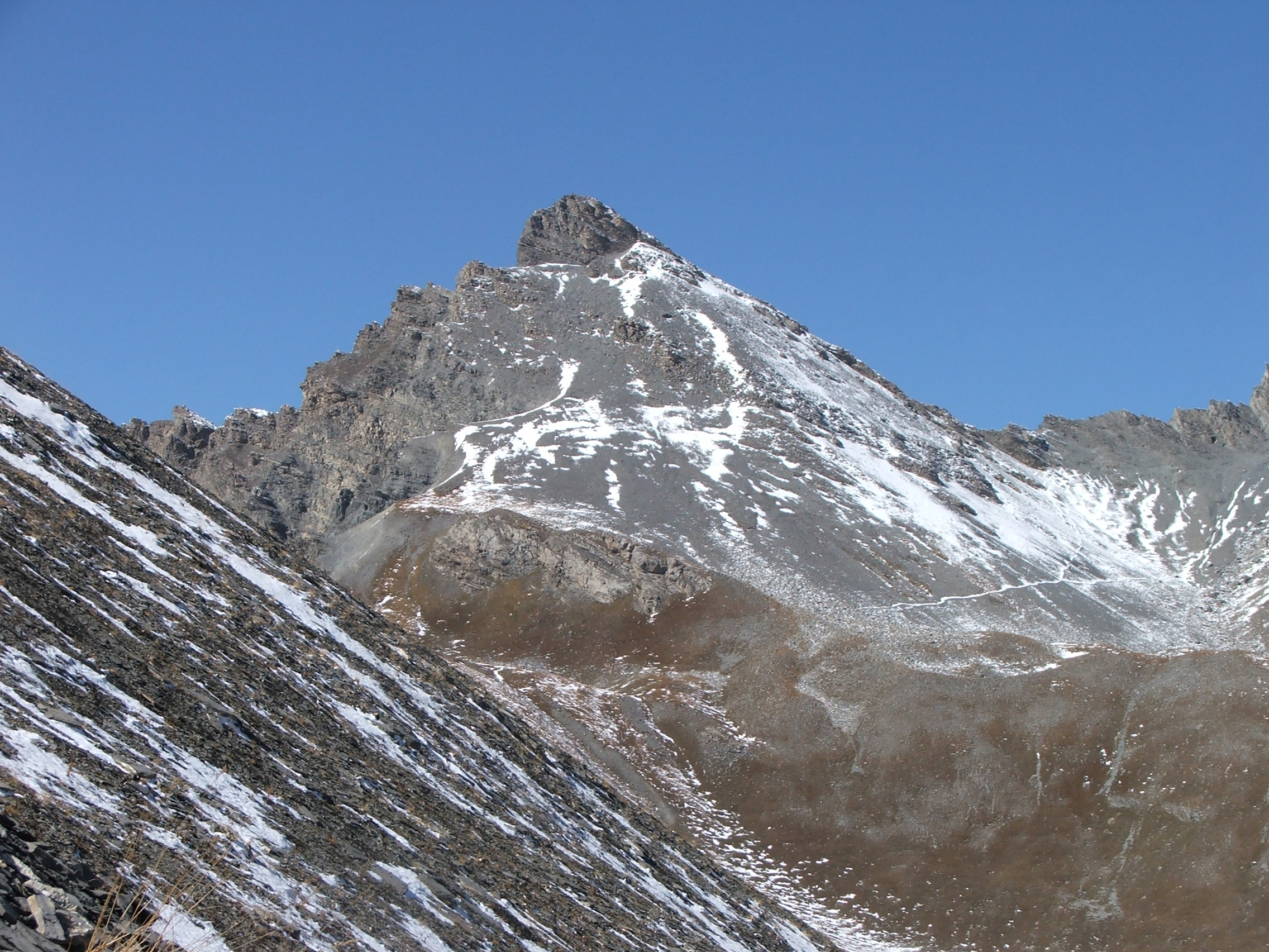 Foto della Rocca dei Tre Vescovi, di Orobicon